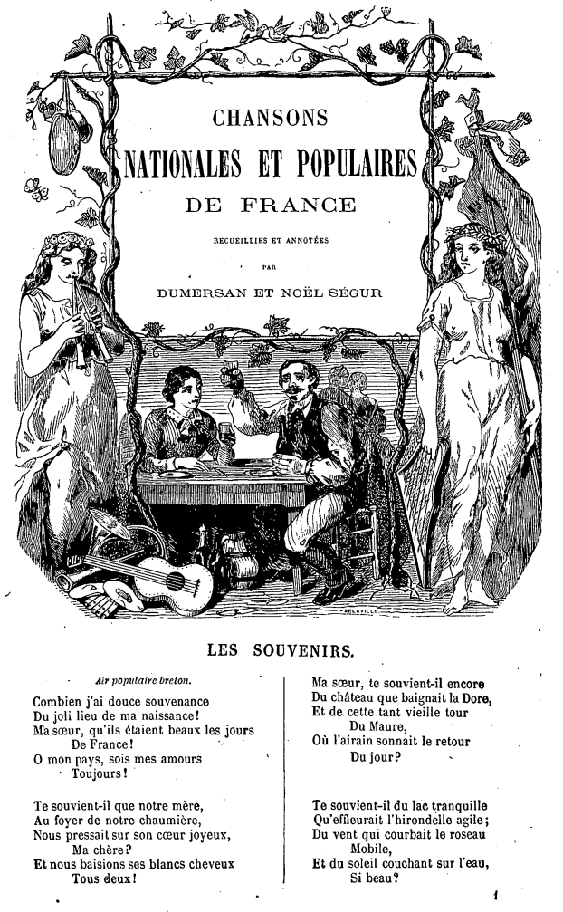 Frontispiece of Chansons nationales et populaires de France by Théophile Marion Dumersan (1780-1849)